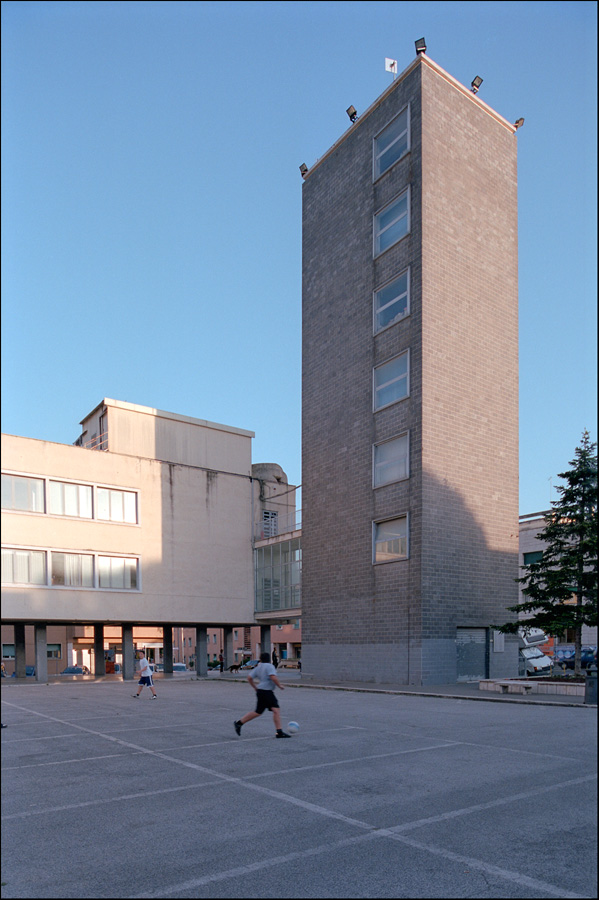 08/05/2009 : Guidonia (RM), piazza Matteotti (già piazza del Municipio): palazzo per gli uffici, torre dei sindacati e loggia dei mercanti (Giorgio Calza Bini, 1937)